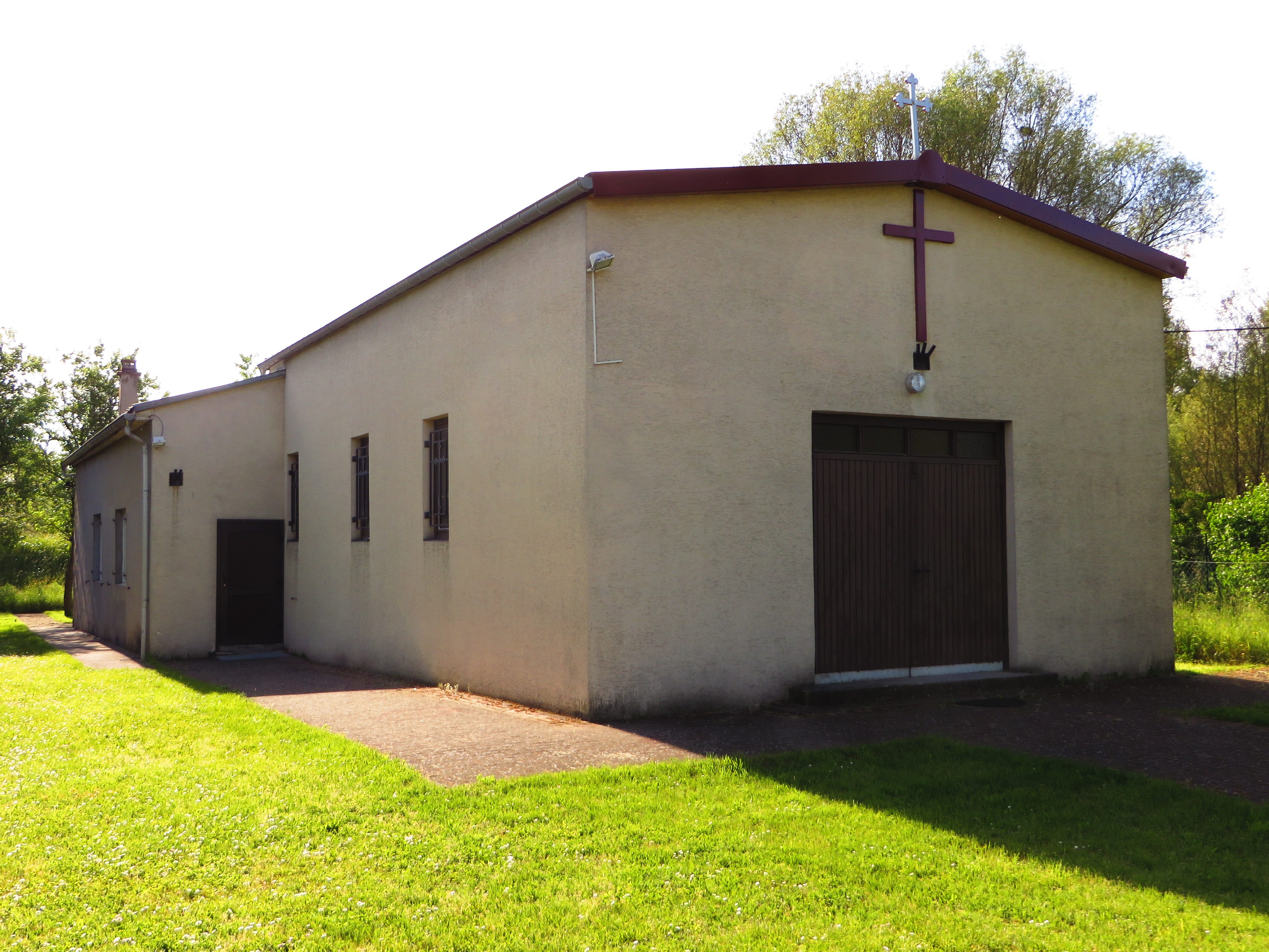 Betting eglise orthodoxe